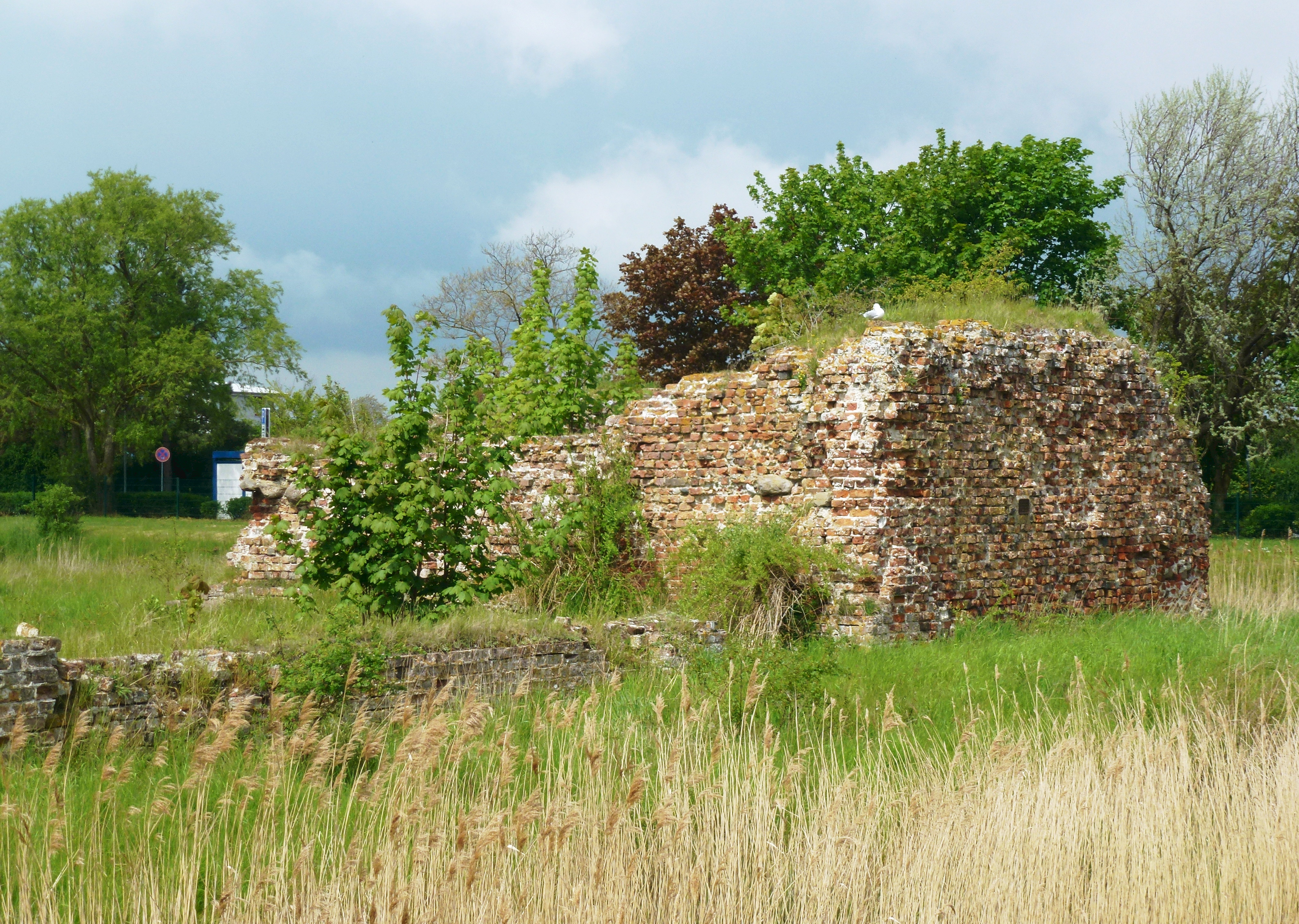 Burgruine Glambeck